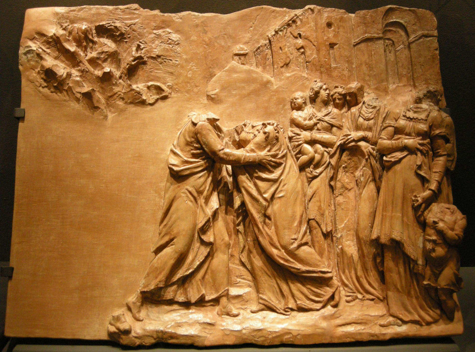 Giambologna (attr.) incontro di gioacchino e anna